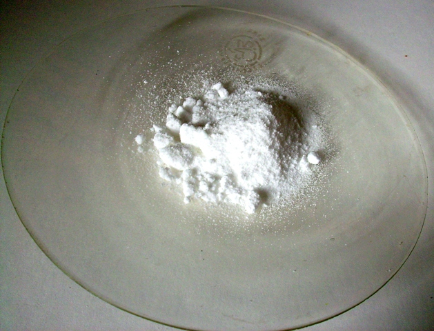 Na2S2O8